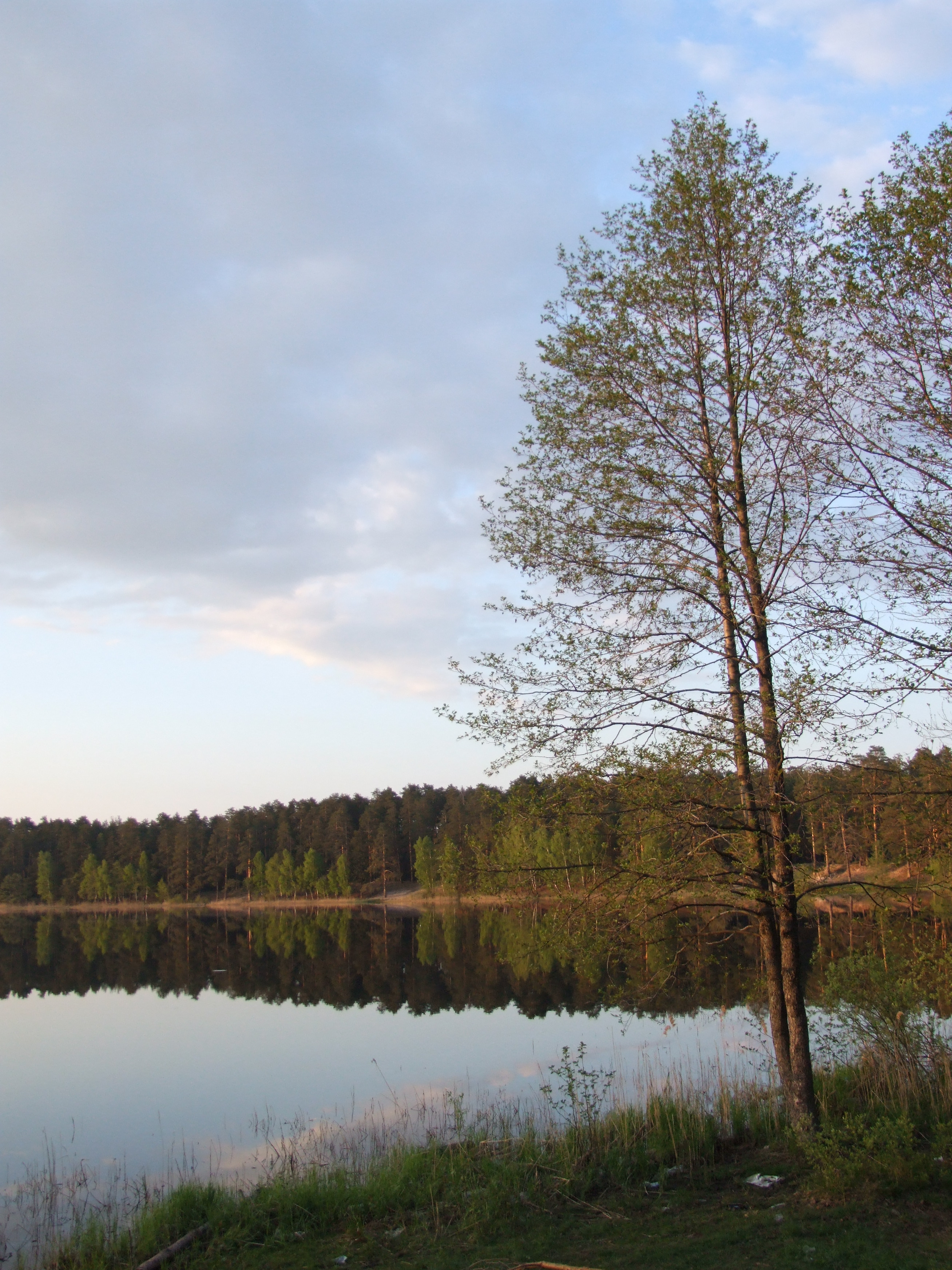 Владимирская обл, г. Покров. Черное озеро (вид с полуострова).